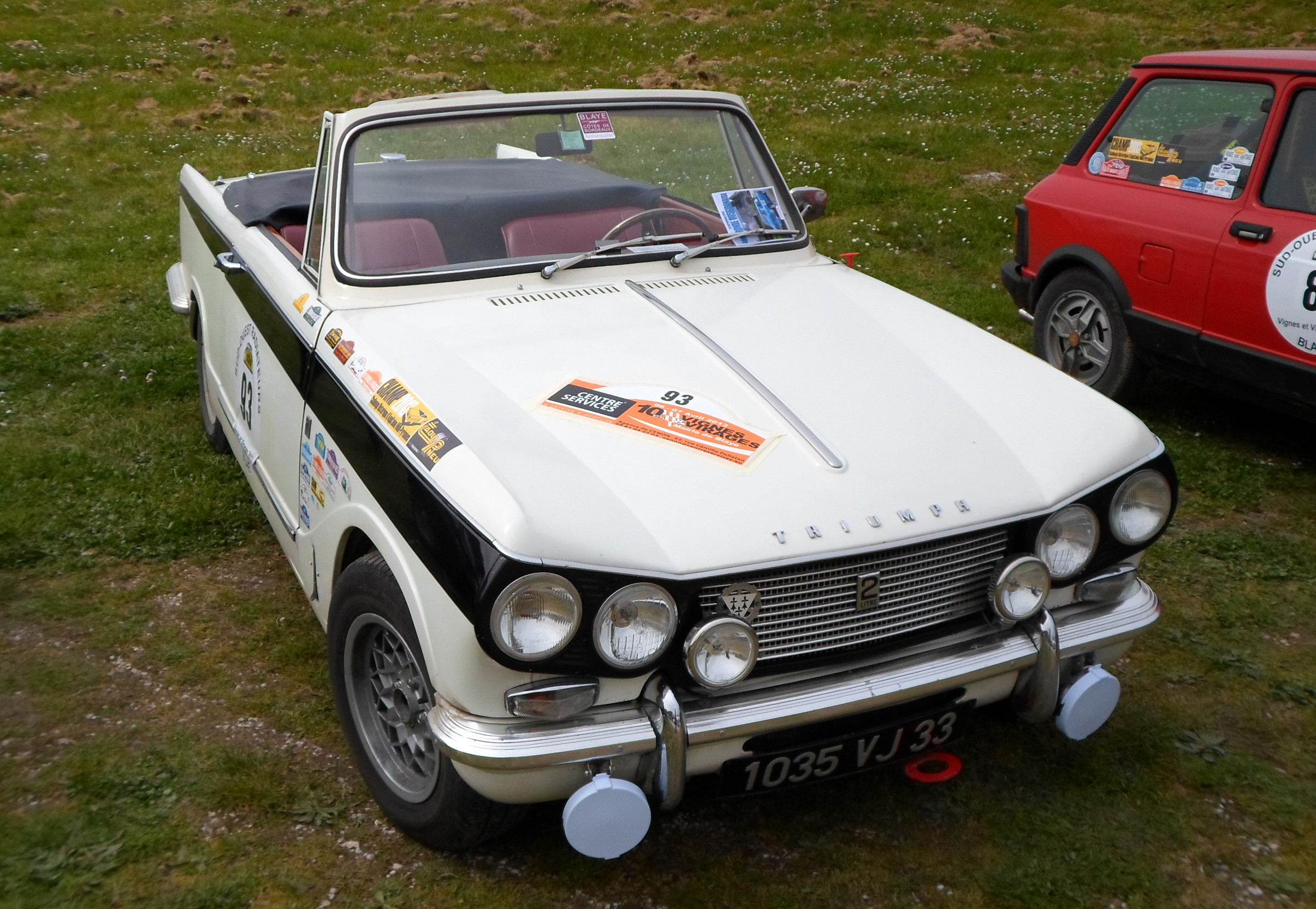 Triumph Vitesse Blaye 2013